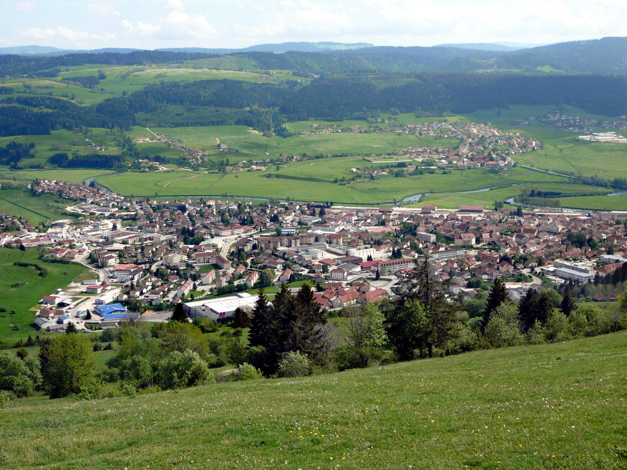 Morteau vu du mont Vouillot